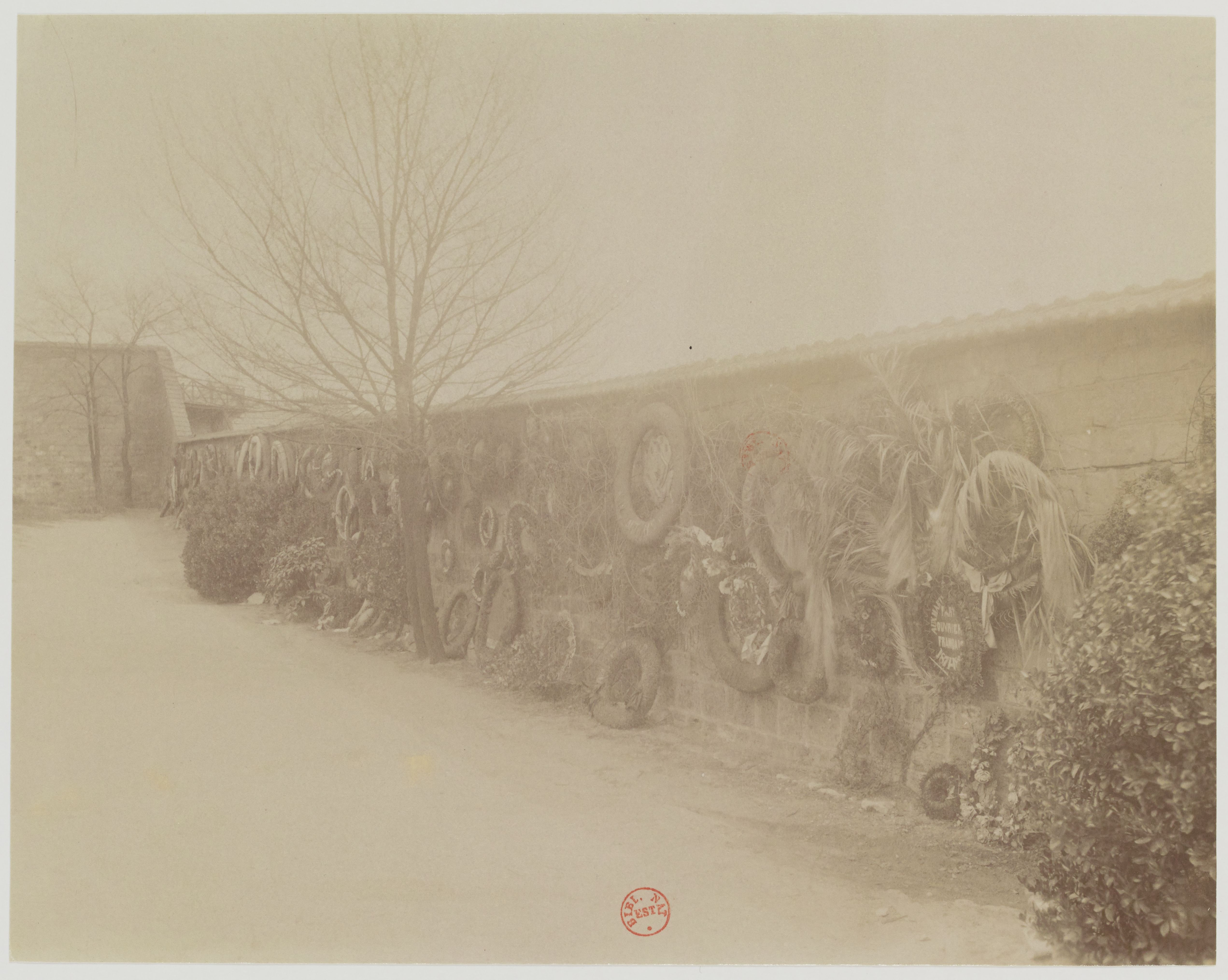 Mur des Fédérés au cimetière du Père-Lachaise en 1900. Photo d'Eugène Atget